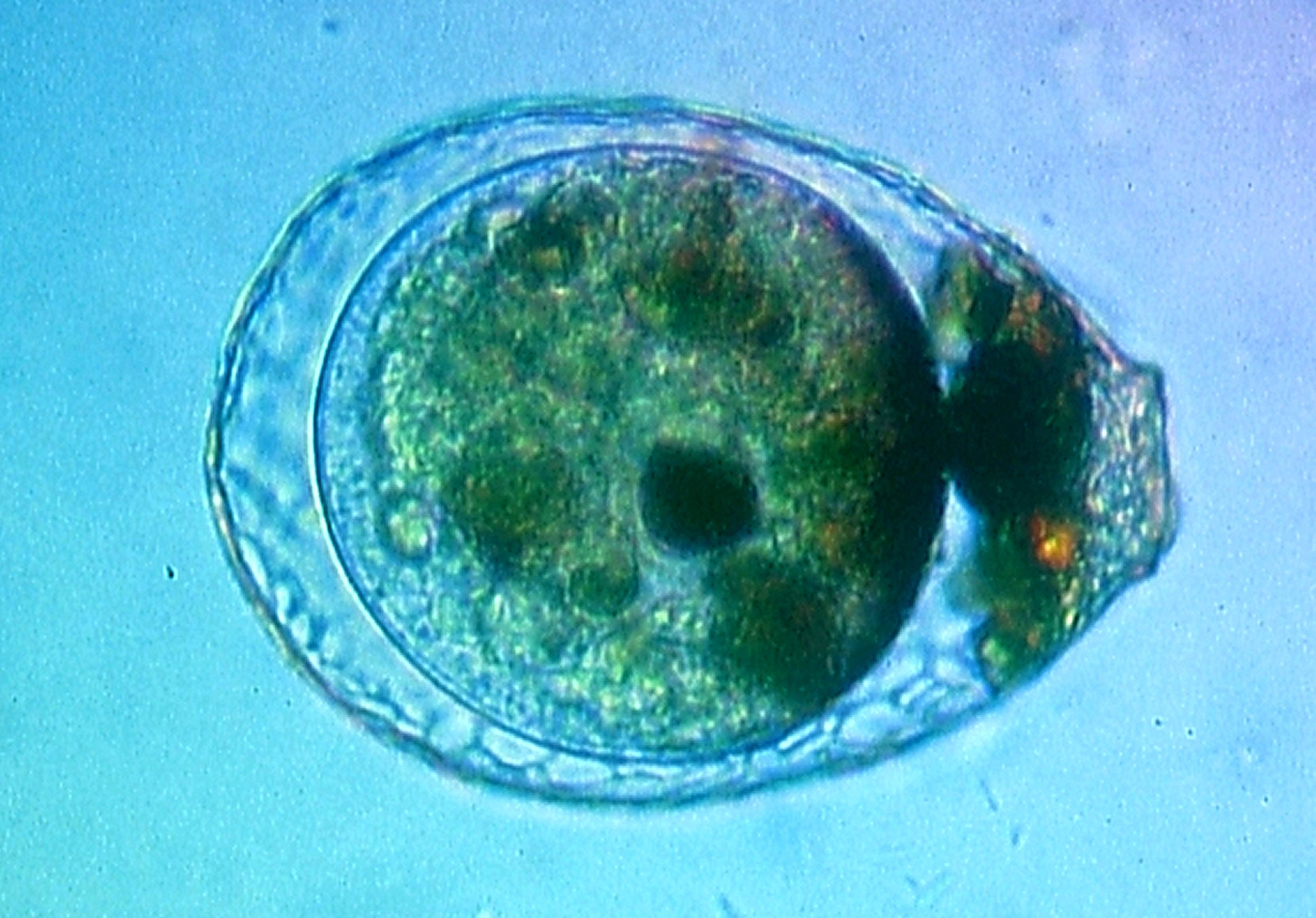 Im Boden lebende Thekamöben können Dauercysten bilden. Somit sind sie resistent gegen Austrocknung